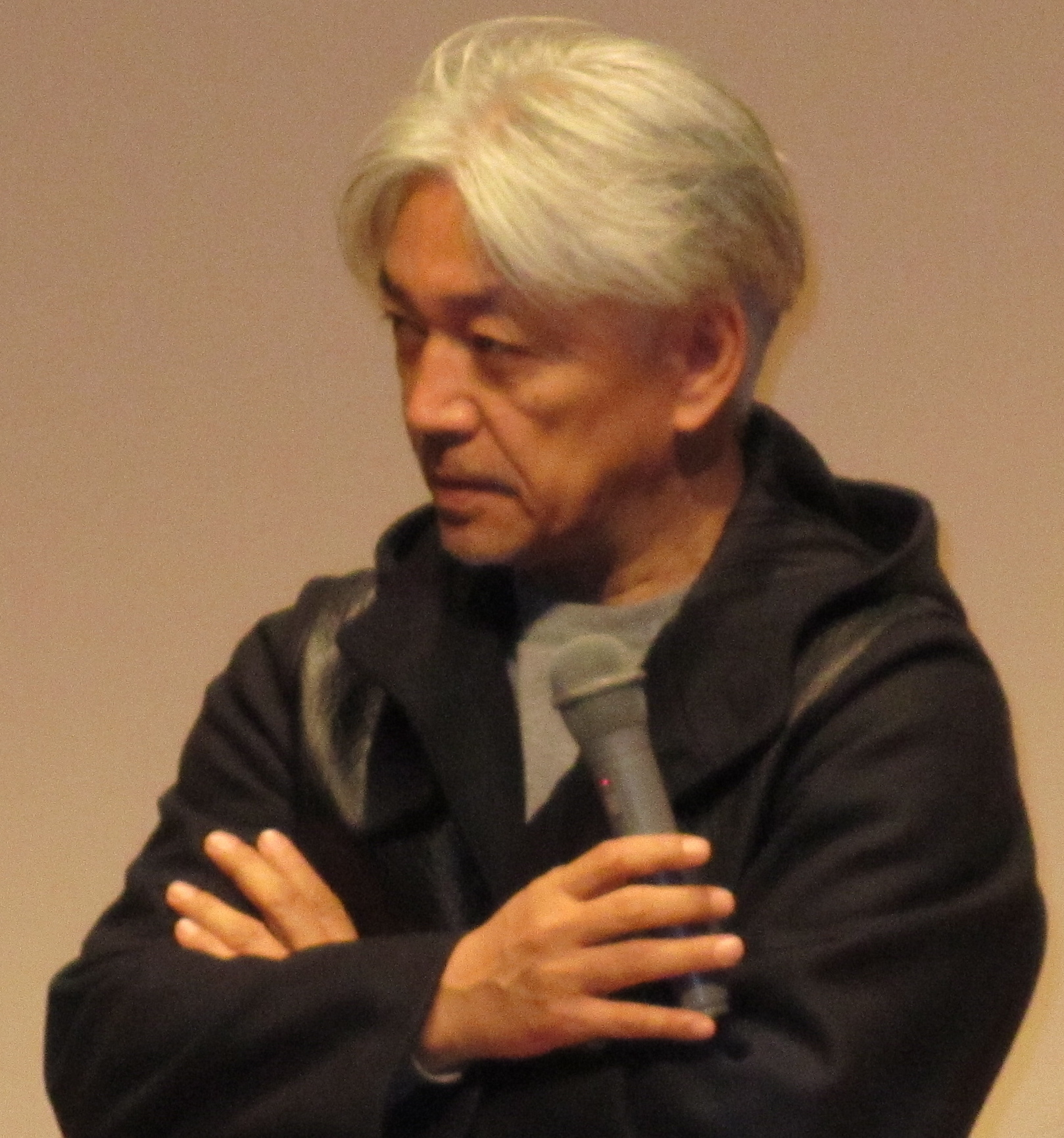 題名：演説中の坂本龍一氏（Academy Awards:Best Music, Original Score Winner for The Last Emperor (1987); 米国アカデミー賞作曲賞受賞、ゴールデングローブ賞受賞、映画音楽家、作曲家、演奏家、音楽プロデューサー、東京芸術大学大学院音楽部修士） 場所：「饗宴IV」Grand Hall(品川) 日時：2013年12月22日(日)